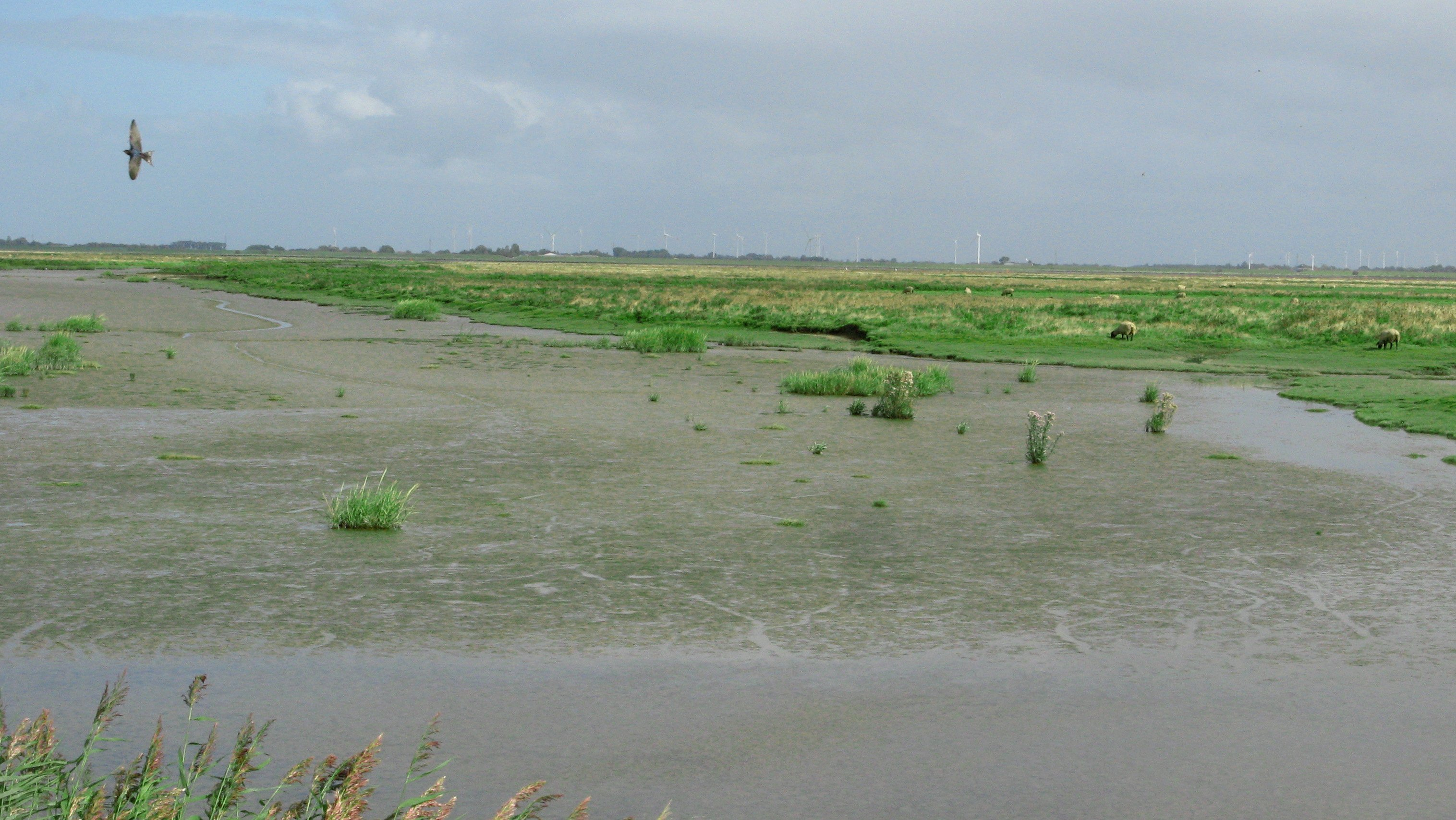 katinger watt in the eider estuary